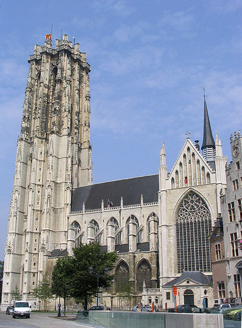 St. Romboutskathedraal (Mechelen, Belgium)